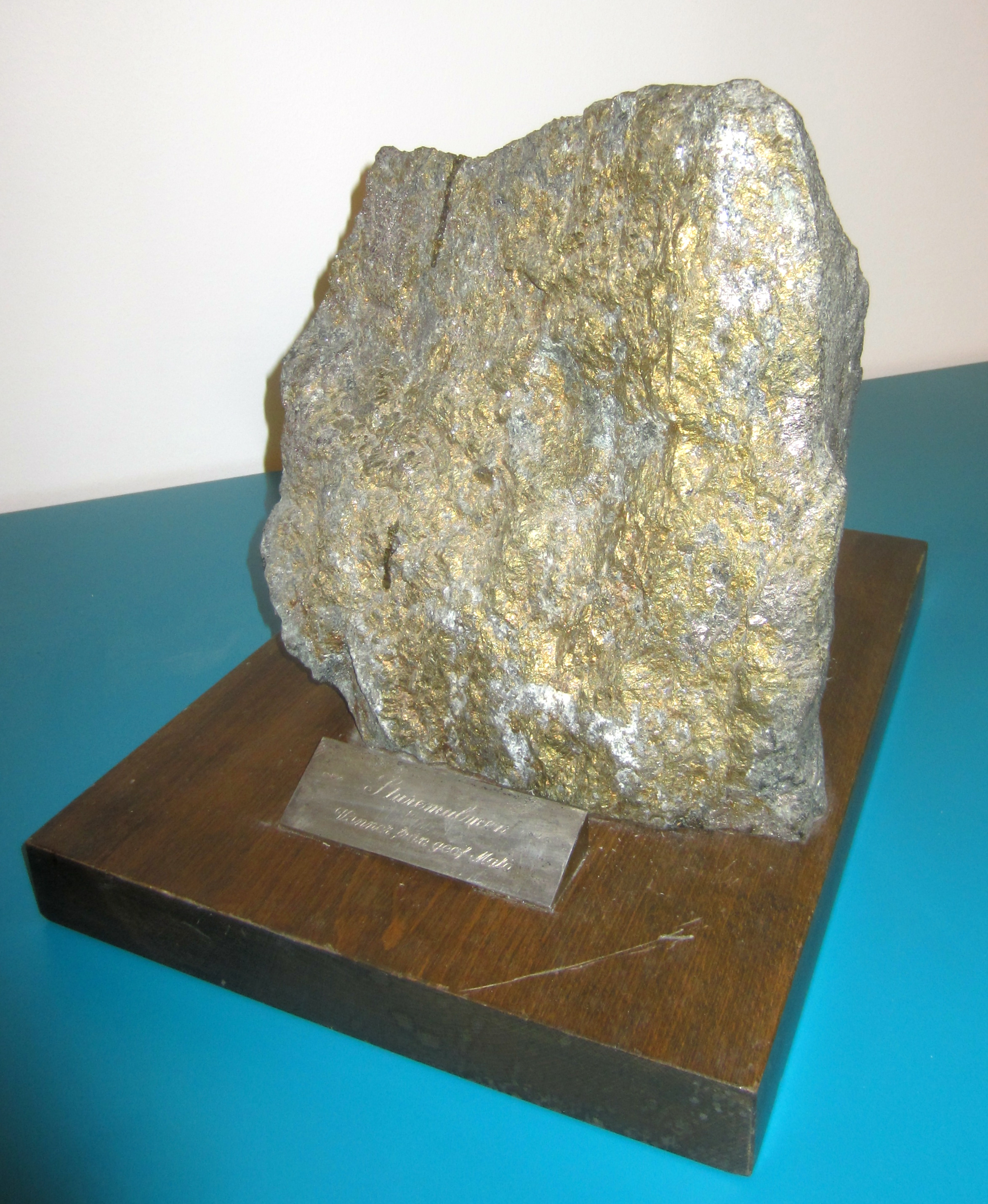 Sturemalmen, kopparhaltig bergart från området Rävlidmyran i Skelleftefältet. Den är uppkallad efter Sture Werner, som var chefsgeofysiker vid Sveriges Geologiska Undersökning (SGU) 1936-74.